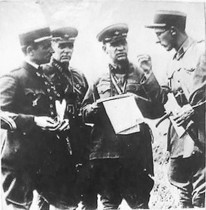 Подполковник А. И. Лизюков в составе советской делегации на учениях французской армии в Шампани, Франция, 1935 год. «Французские офицеры дают советским представителям пояснения о ходе манёвров.»